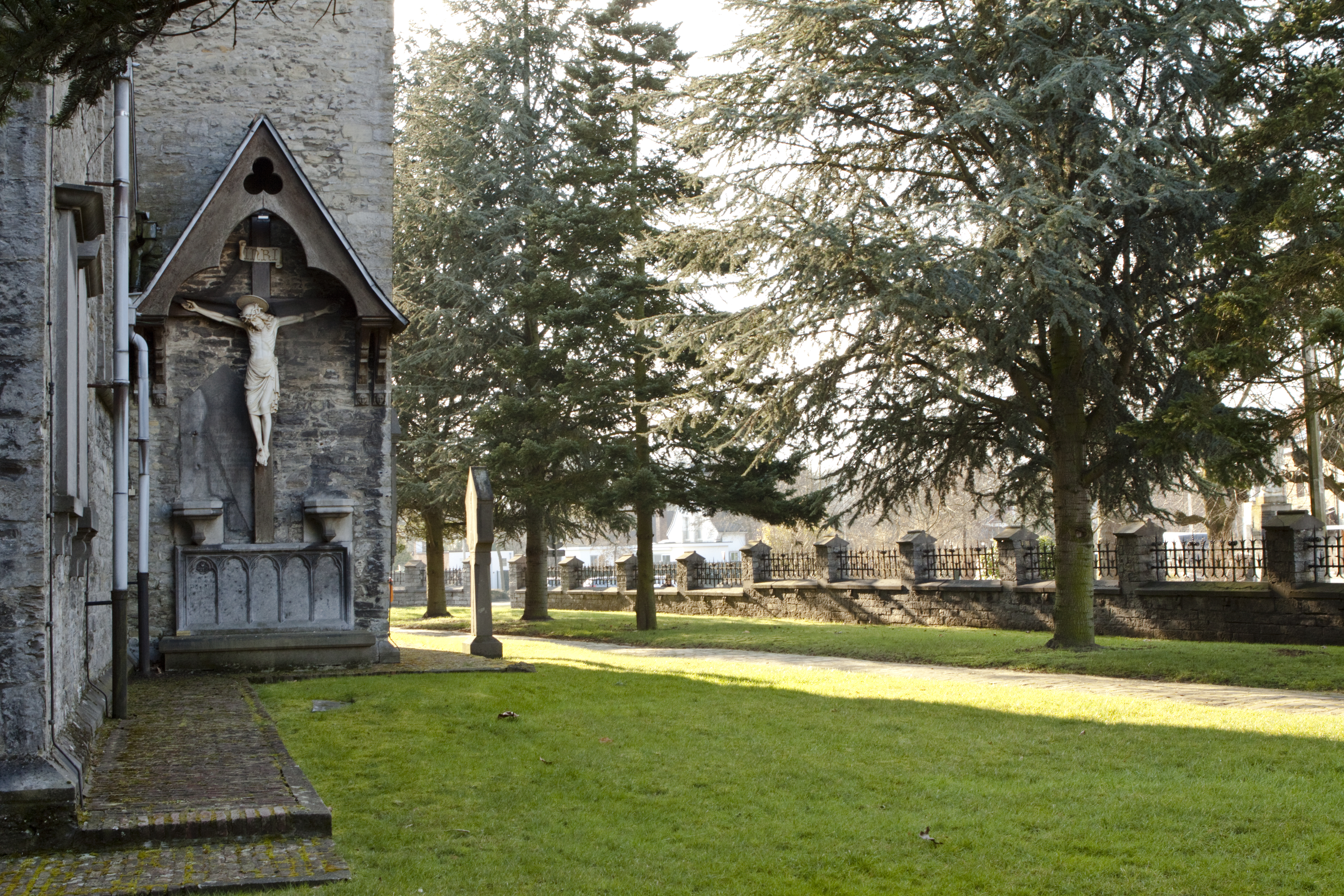 Onze-Lieve-Vrouw geboortekerk, Mariakerke (O-Vl.)